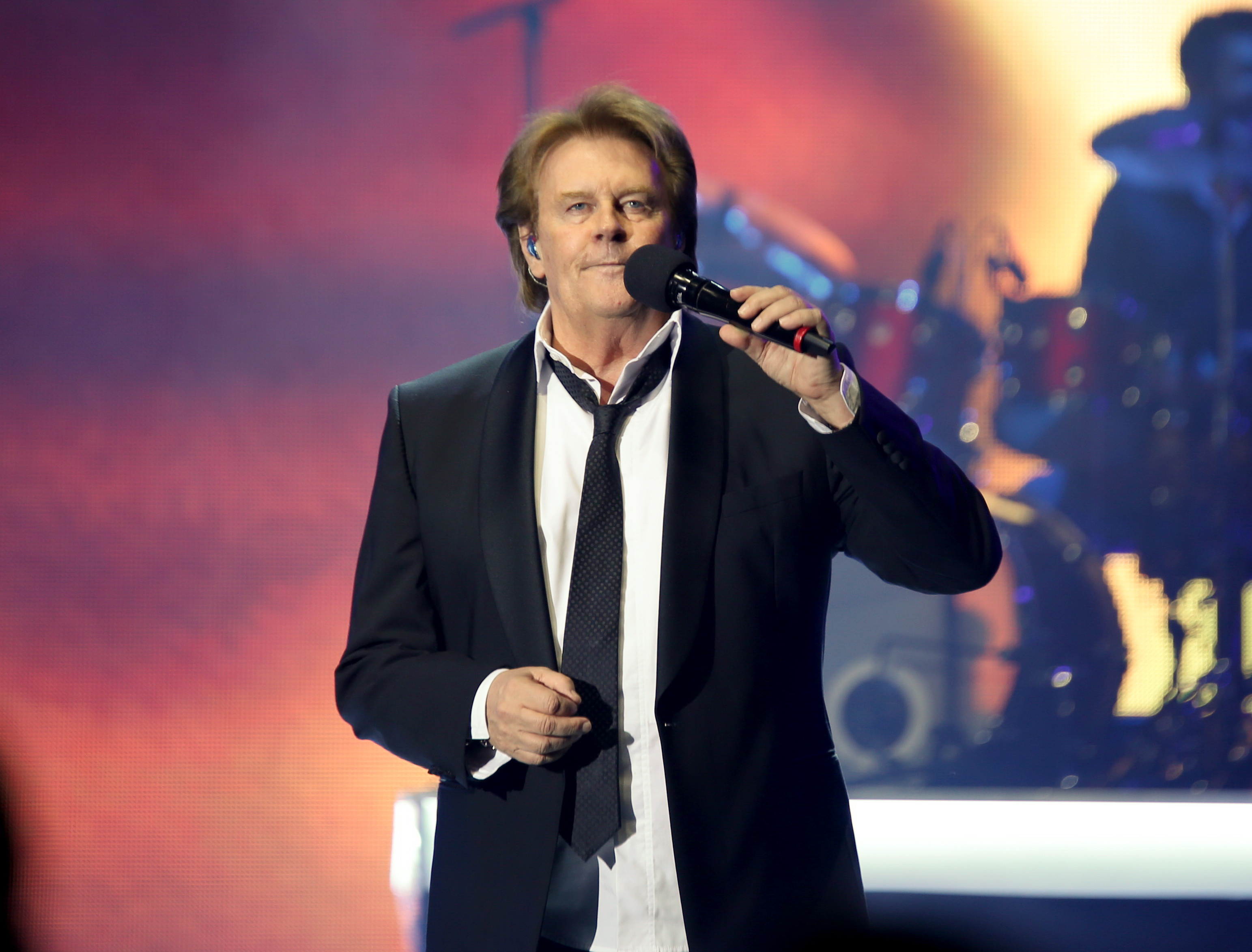 Howard Carpendale in der BigBOX Allgäu am 26. Februar 2016 Festivalsommer This photo was created with the support of donations to Wikimedia Deutschland in the context of the CPB project "Festival Summer". This file is made available under the Creative Commons CC0 1.0 Universal Public Domain Dedication. The person who associated a work with this deed has dedicated the work to the public domain by waiving all of their rights to the work worldwide under copyright law, including all related and neighboring rights, to the extent allowed by law. You can copy, modify, distribute and perform the work, even for commercial purposes, all without asking permission. Thomas Springer Personality rights warningAlthough this work is freely licensed or in the public domain, the person(s) shown may have rights that legally restrict certain re-uses unless those depicted consent to such uses. In these cases, a model release or other evidence of consent could protect you from infringement claims.